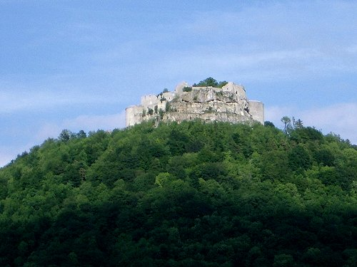 Foto der Burgruine Hohenneuffen (Public Domain, selbst fotografiert)